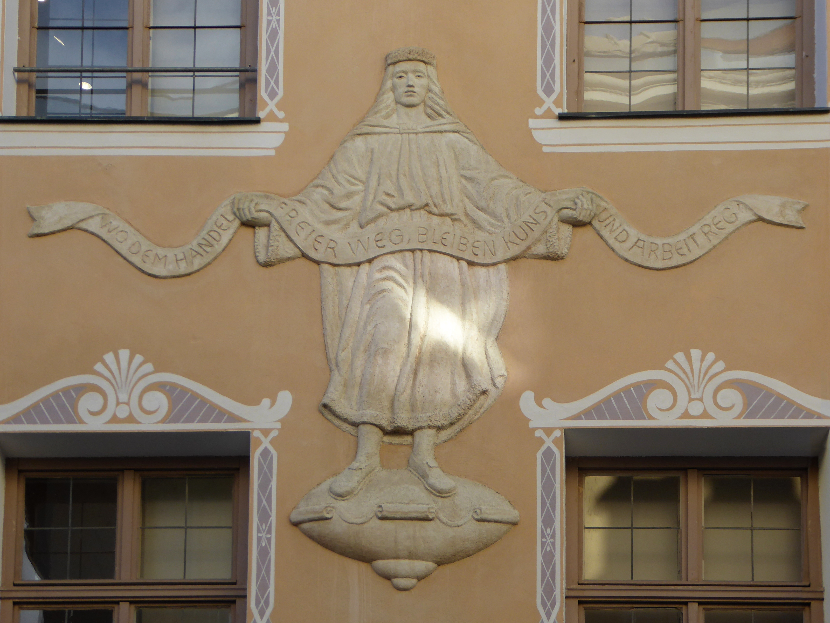 Bruneck (Südtirol), Detail am Haus Stadtgasse 48.